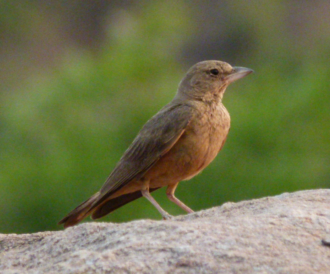 Ammomanes phoenicura at Daroji WLS, India